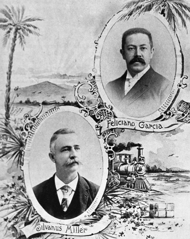 Feliciano Garcia (administrador) y Silvanus Miller (ingeniero en jefe) del Ferrocarril del Norte de Guatemala en 1896.